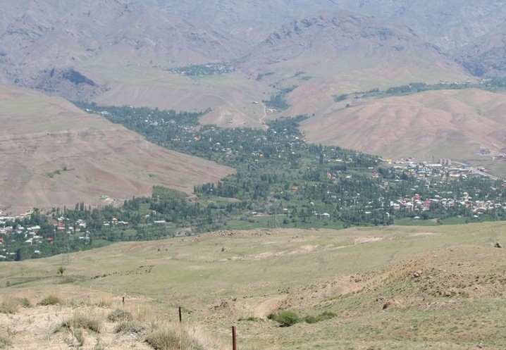 نماي شهر شهرك طالقان مركز دهستان ميان طالقان